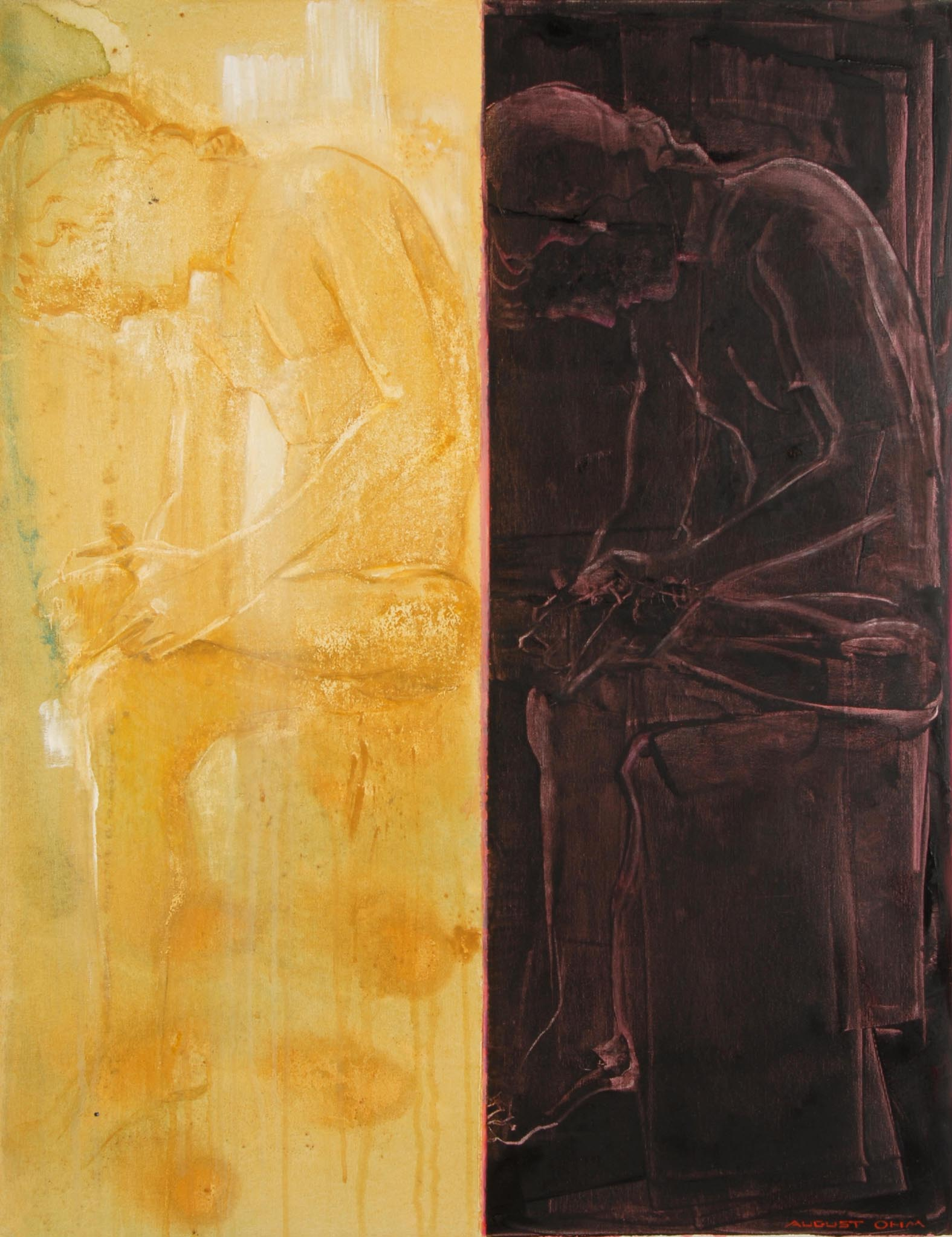 Der Dornauszieher